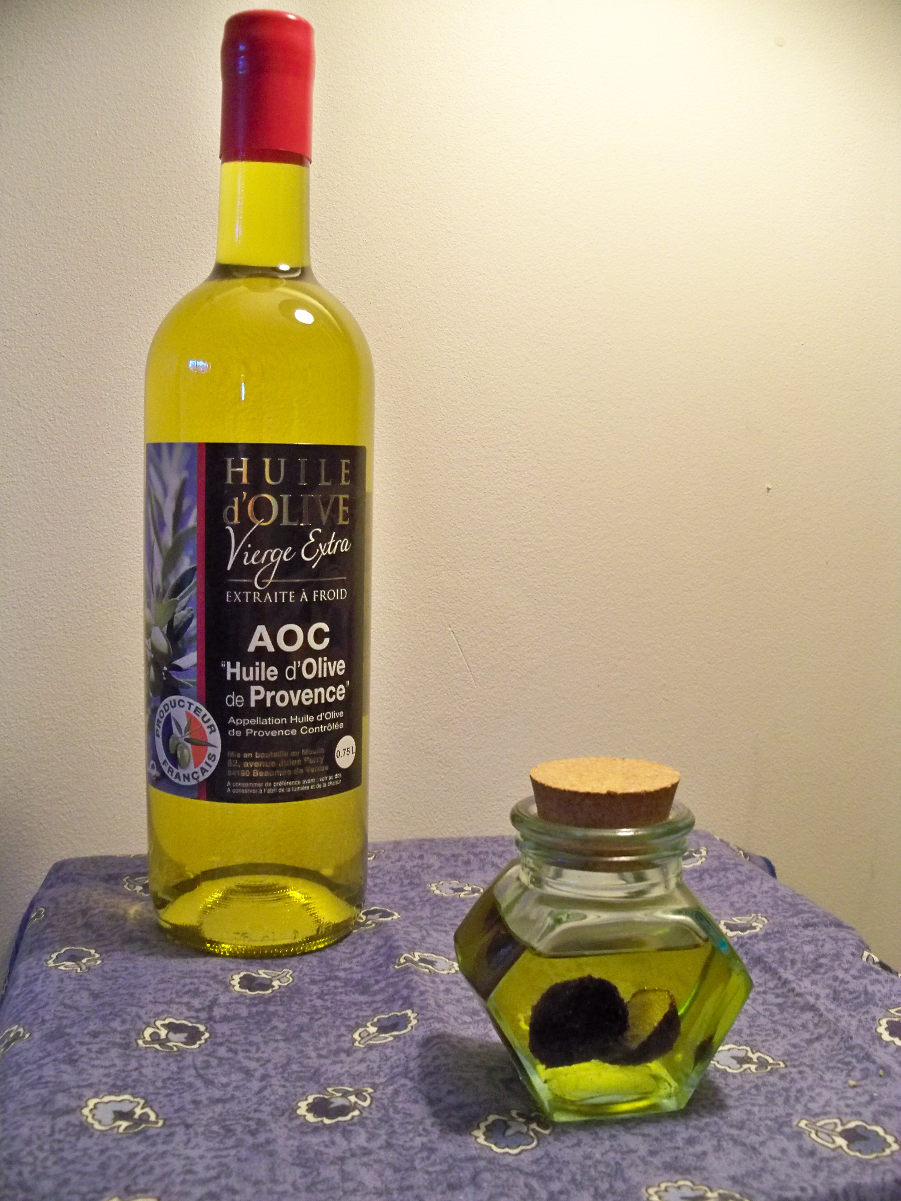 Truffes blanches d'été à l'huile d'olive